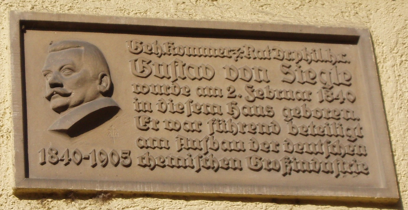 Gedenktafel für Gustav Siegle an dessen Geburtshaus in Nürtingen